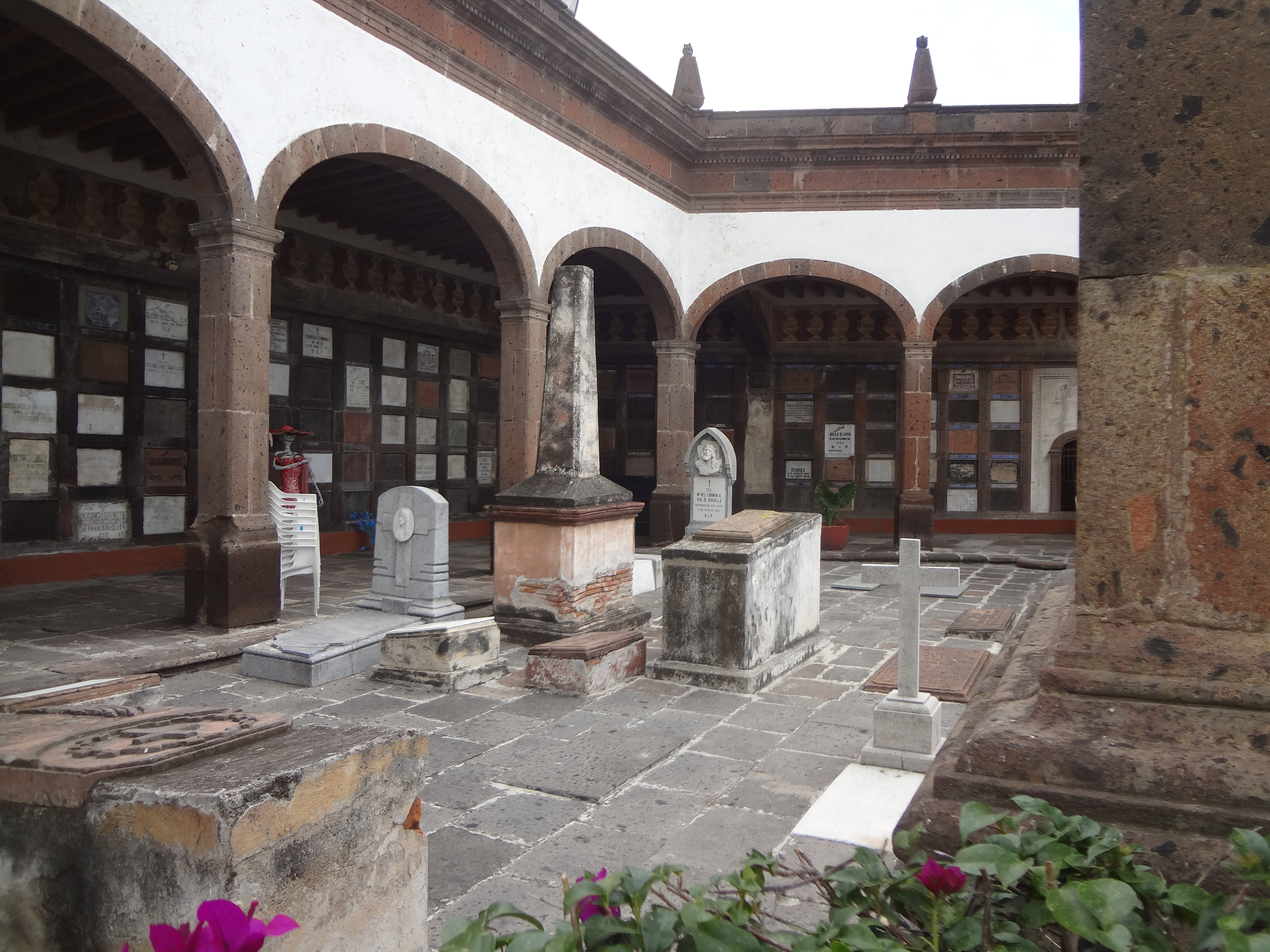 Fotografía: Vista interior del Museo de la Muerte, San Juan del Río, Qro. MEX